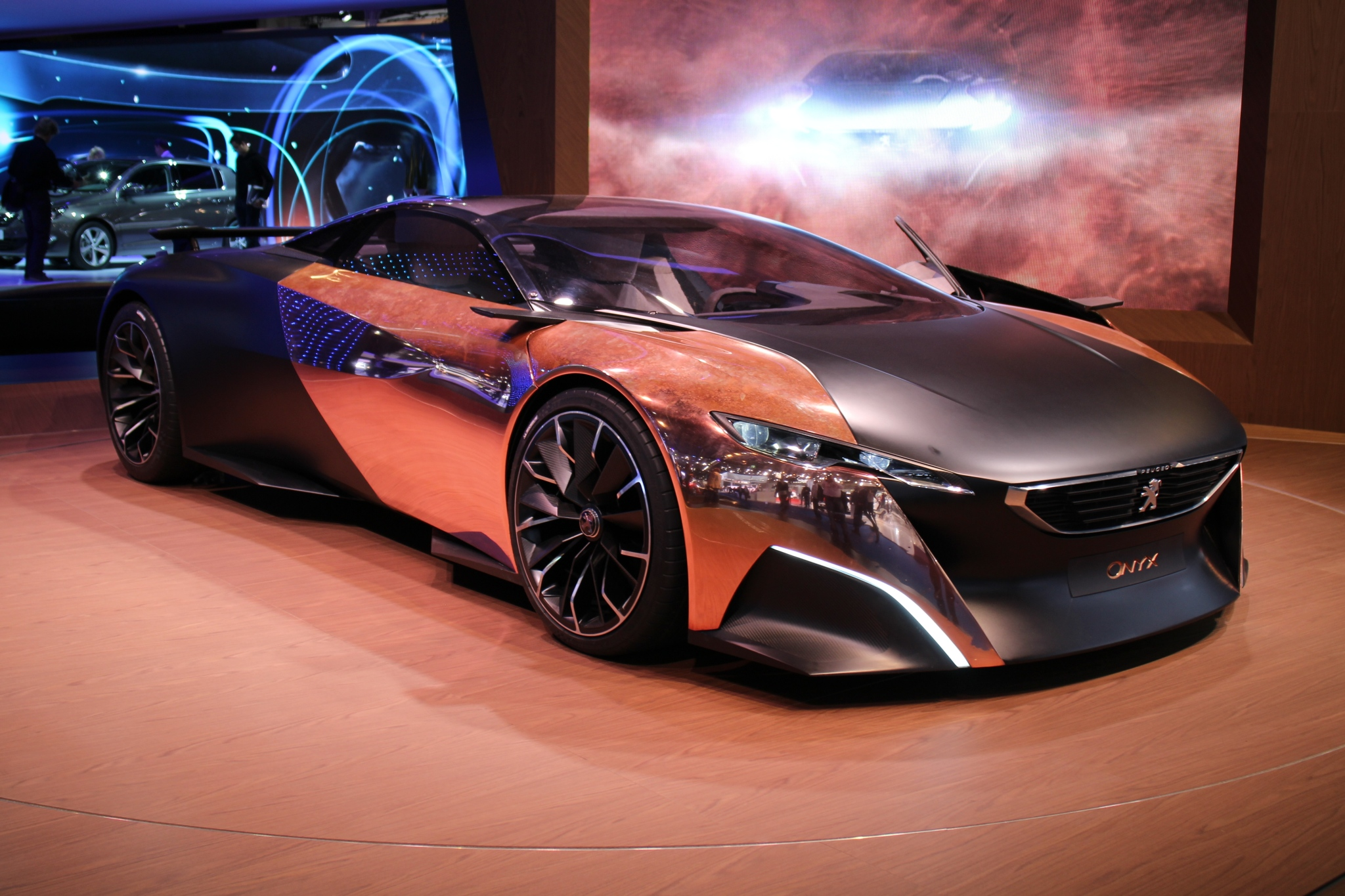 IAA 2013